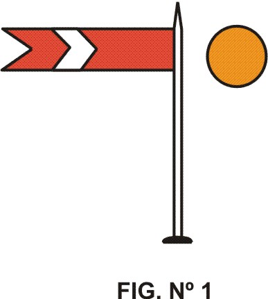 Es un dibujo de una señal de precaución en posición horizontal o luz naranja.